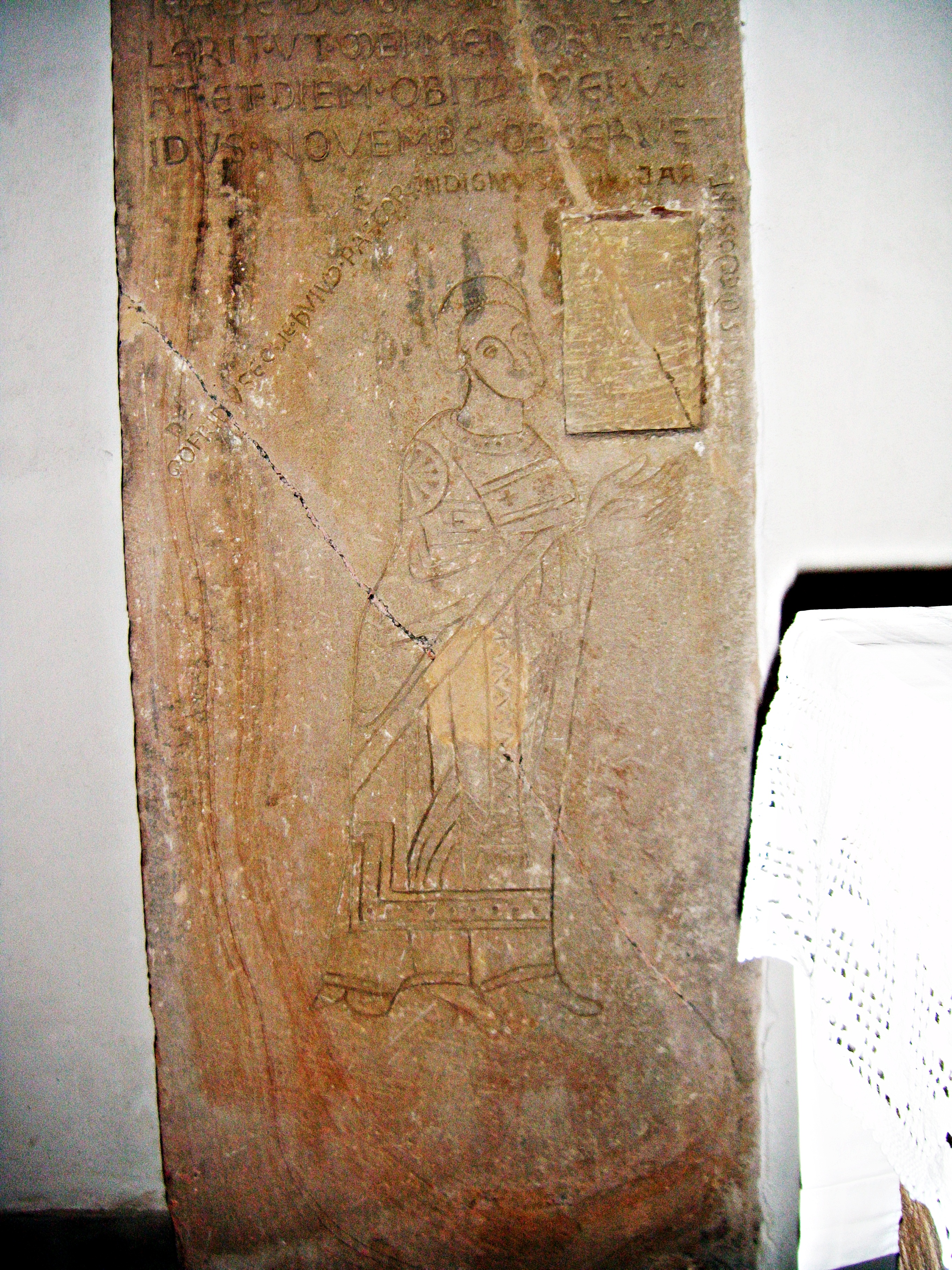 Bubenheim (Pfalz) St. Peterskirche, Stifterinschrift mit Relief des Priesters Gottfried von Beselich, 1163